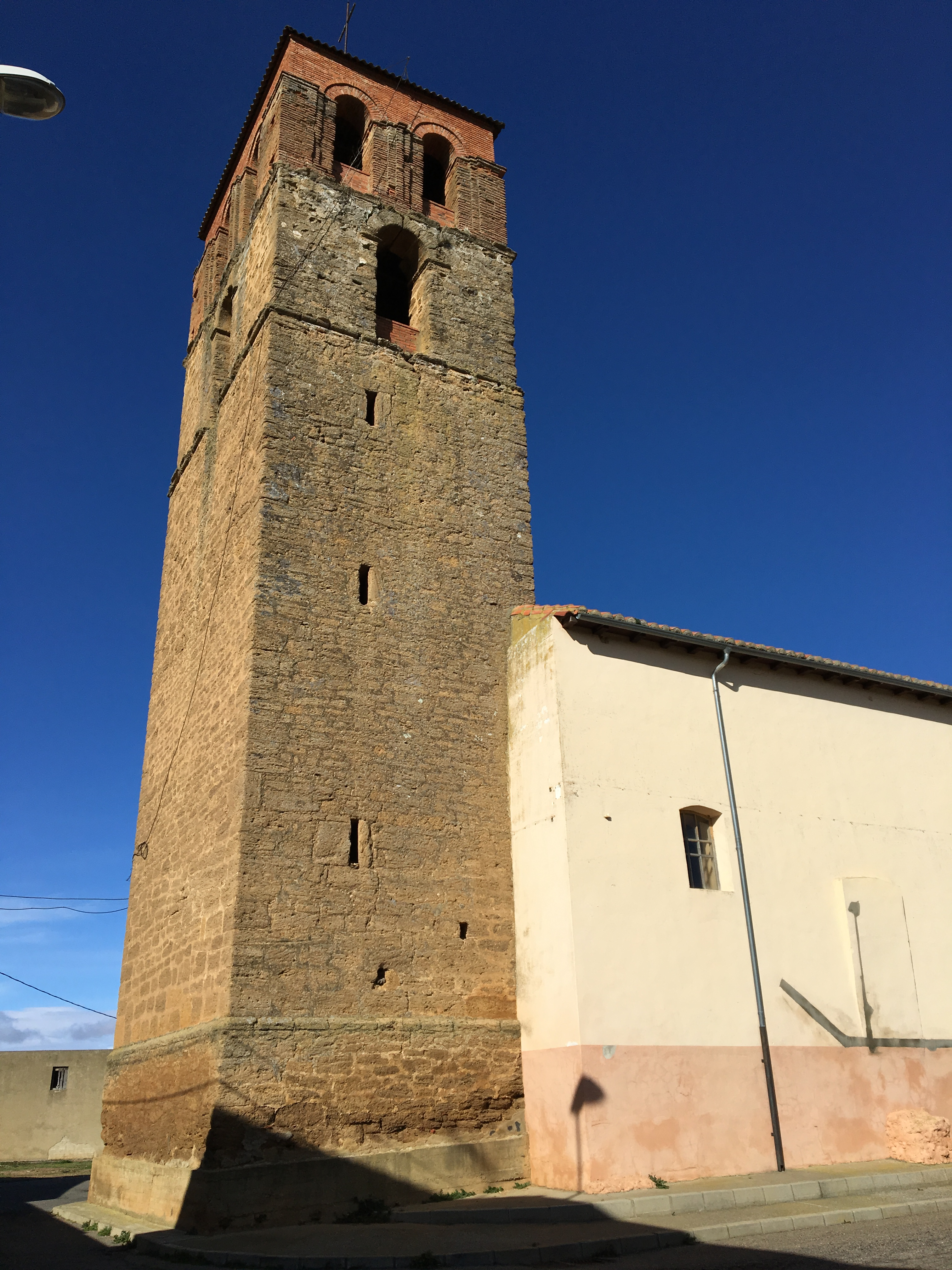 Iglesia de Santa María Magdalena, en Villaornate (León, España).